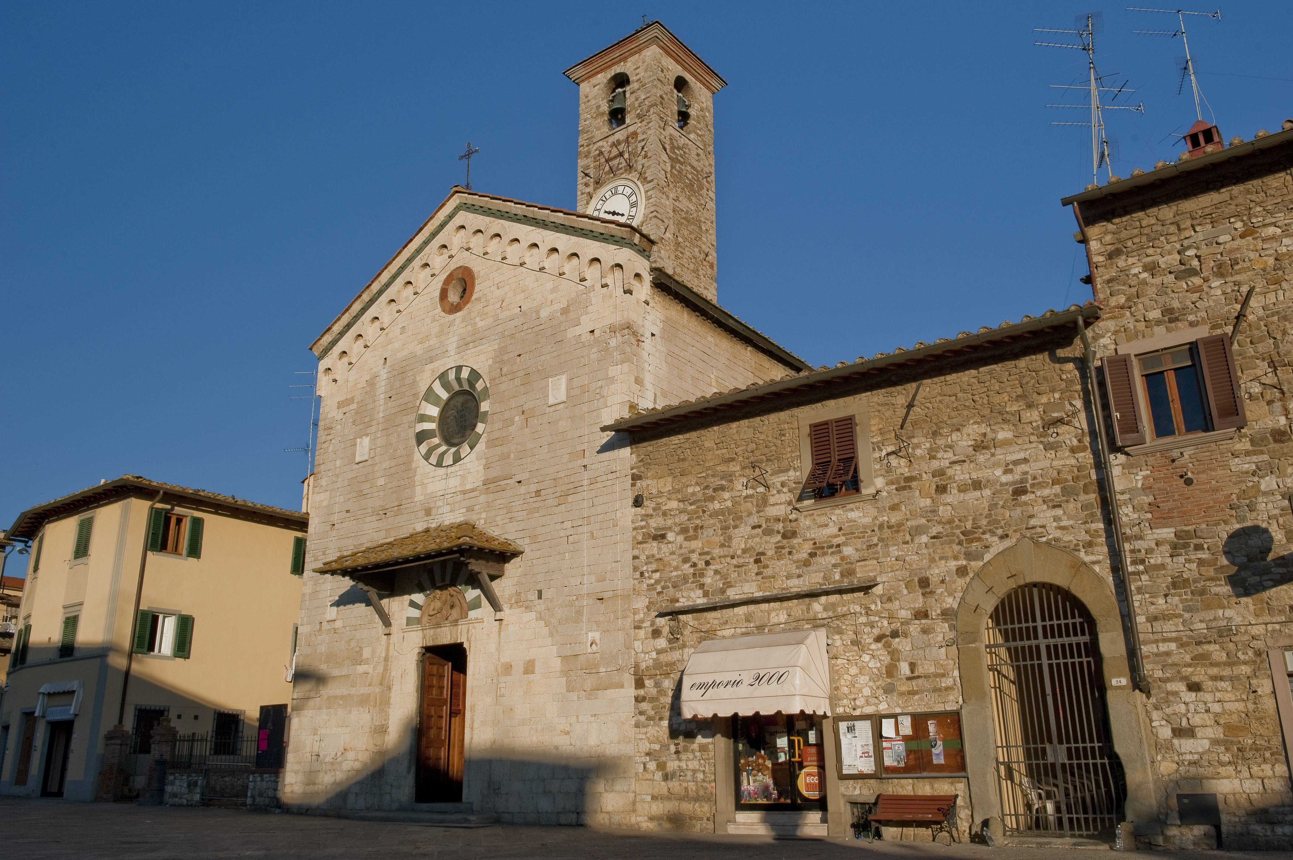 Pieve di Santa Maria ad Antella (Bagno a Ripoli)